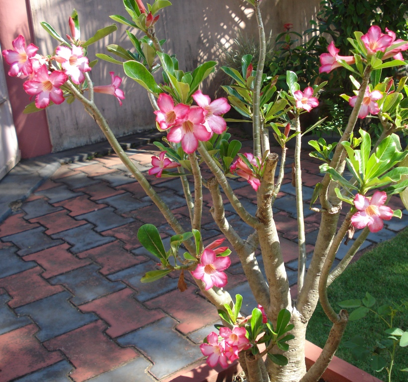 Adenium obesum